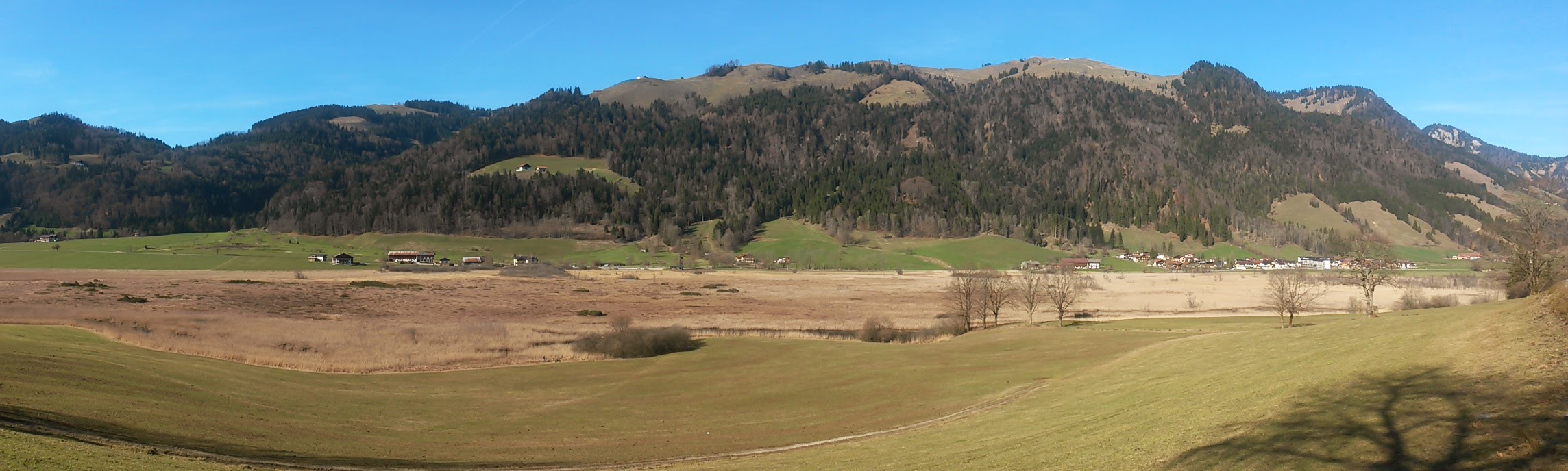 Die Schwemm - Tirols größte Moorlandschaft, bei Walchsee im Kaiserwinkl